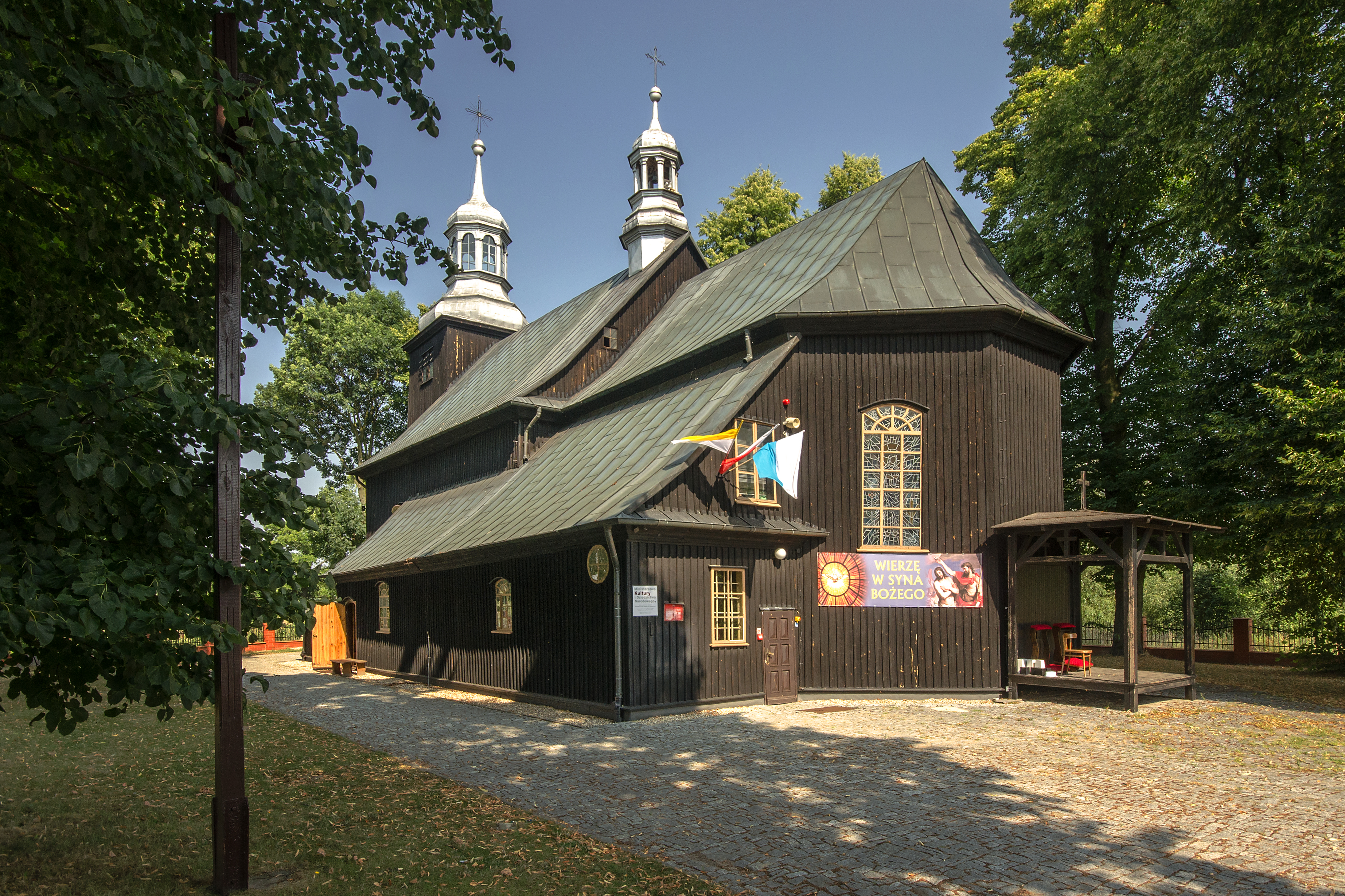 Cieszęcin, kościół św. Wojciecha, 1789